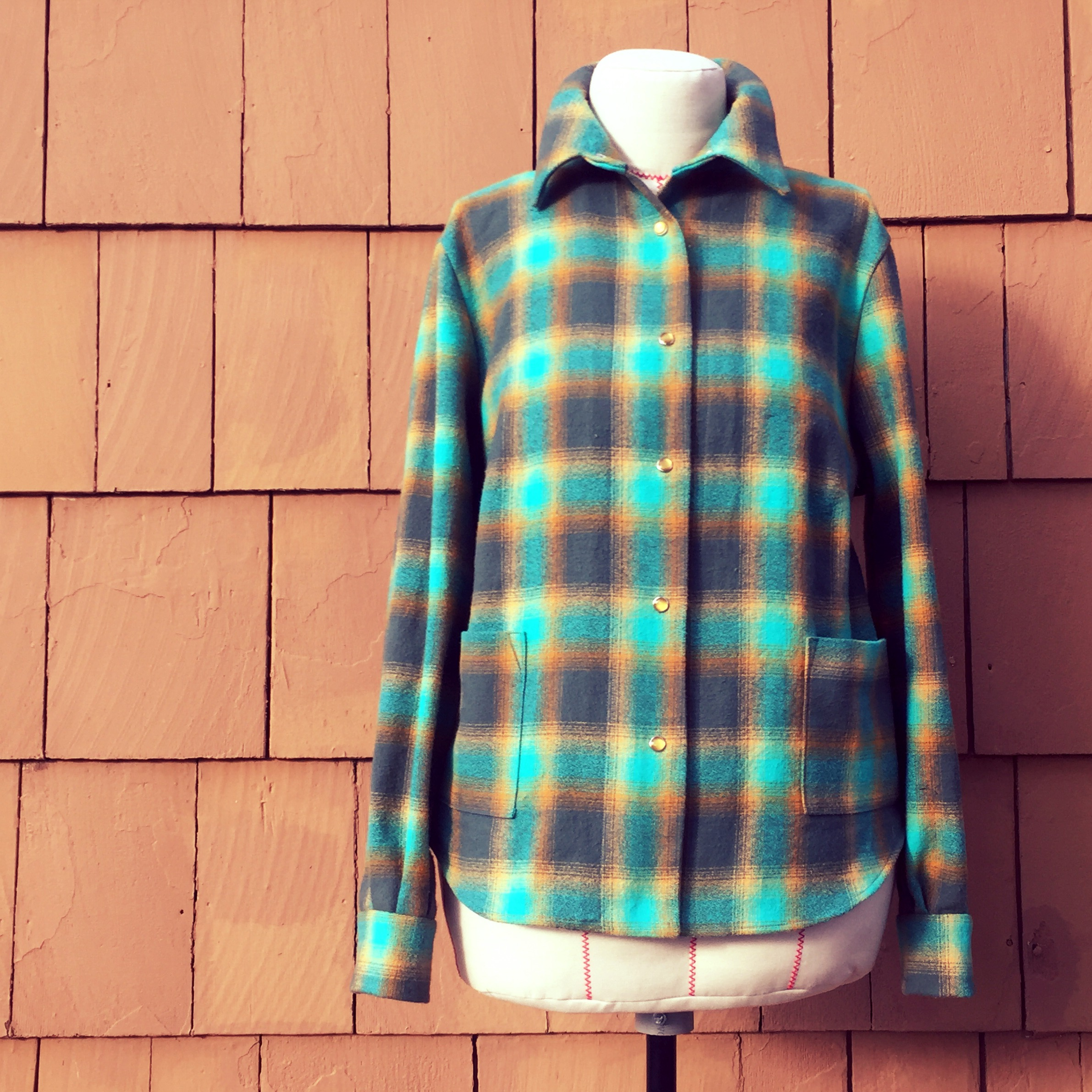 Flanellhemd